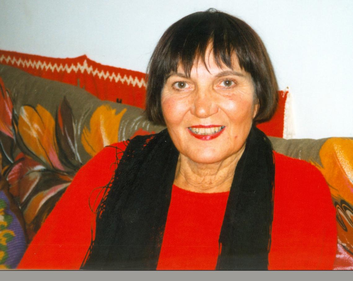 Undatiert